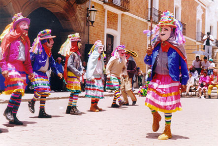 Cuchillos de Toluca de Guadalupe.